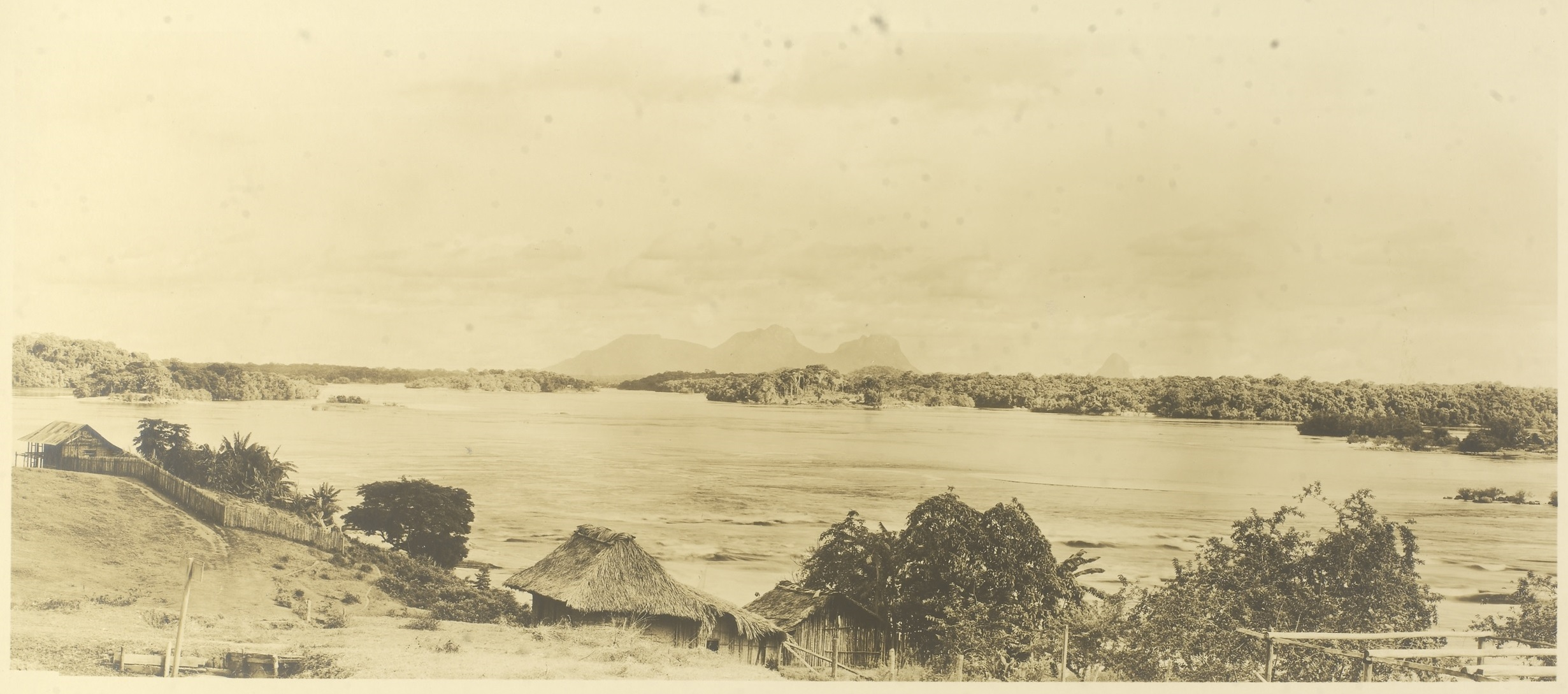 Porto de São Gabriel da Cachoeira e Serra do Curicuriari, Alto Rio Negro